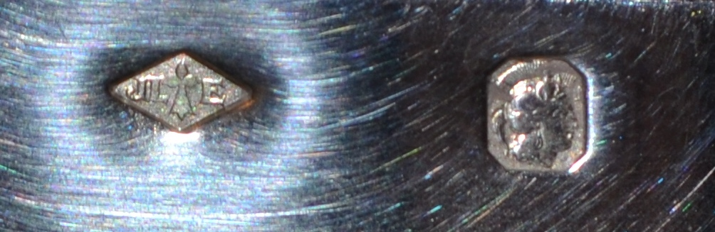 Poinçon de Jean-Louis Évellin (à gauche - JL et E encadrant une hermine héraldique) et poinçon de titre pour l'argent massif.